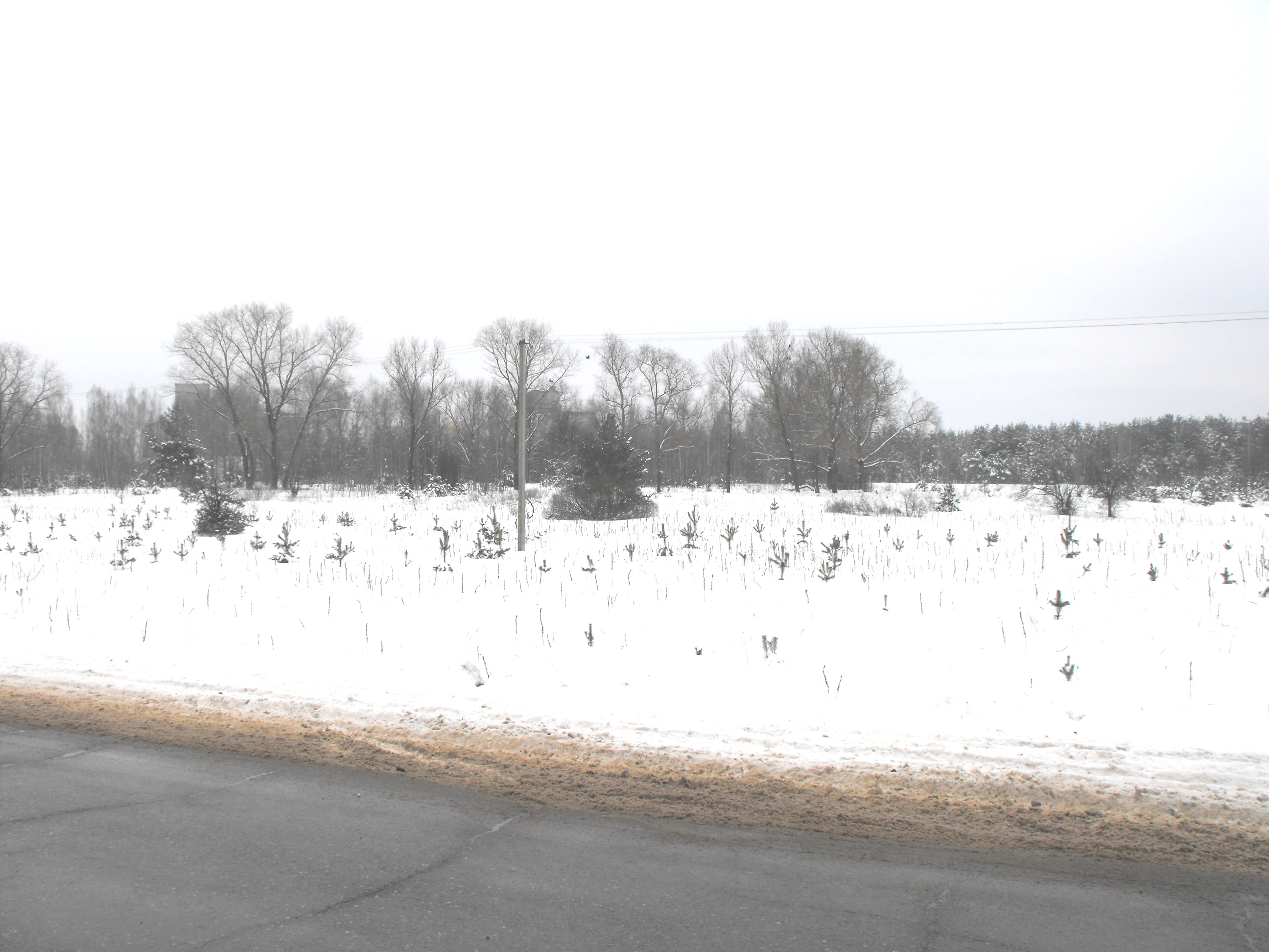 Место массовых расстрелов евреев Осиповичей. Находится слева от дороги Р91 на выезде из города от пересечения улиц Козловской и Рабоче-крестьянской, напротив еврейского кладбища, на территории "7-й площадки" рядом с элеватором. Не обозначено никаким знаком.